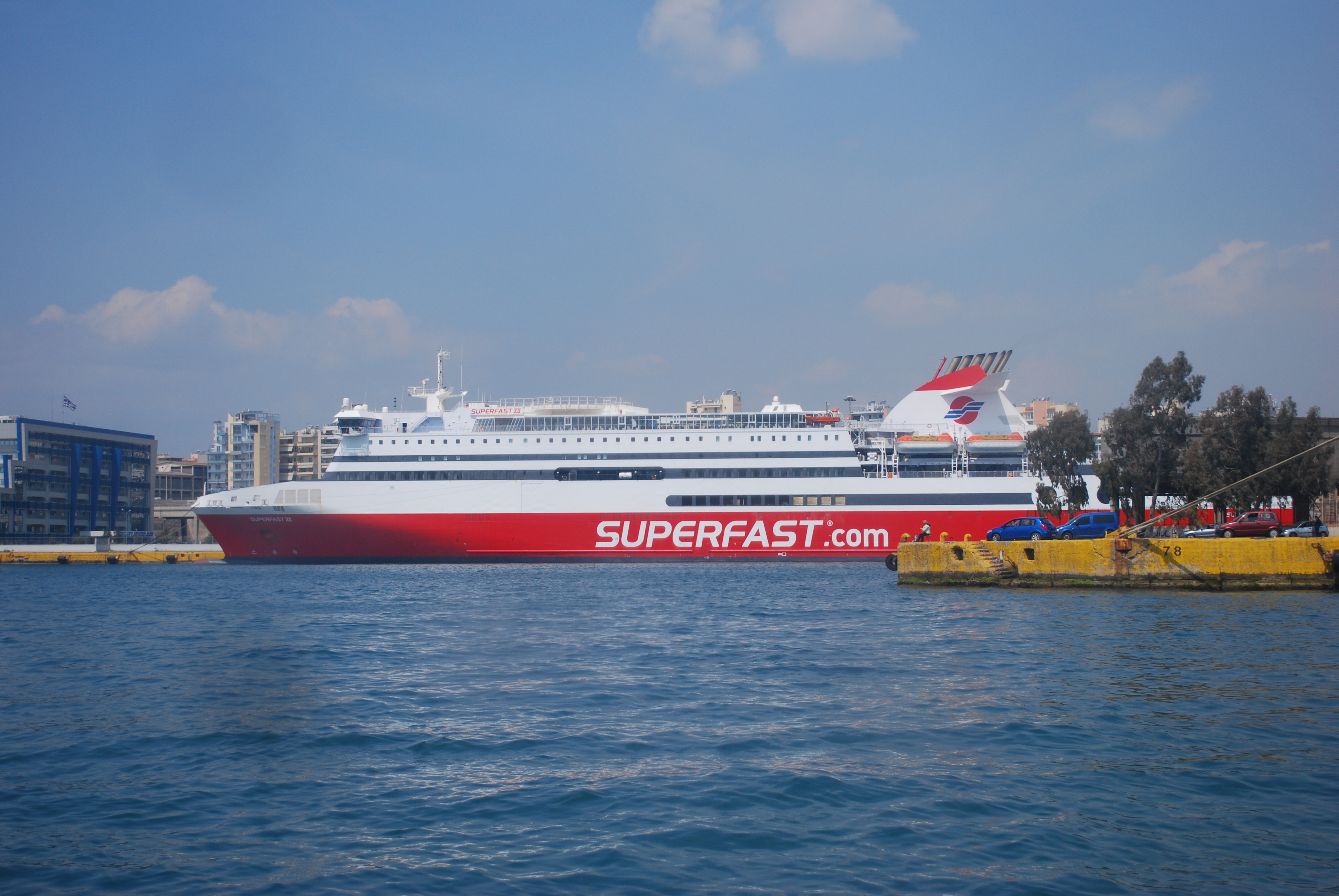 Vue du port du Pirée.